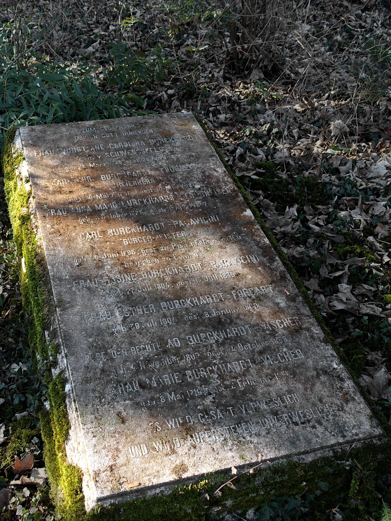 Karl Burckhardt-Paravicini (1795–1850) Jurist, Politiker, Bürgermeister von 1832–1846, Präsident des Zivilgerichts. Familiengrab auf dem Friedhof Wolfgottesacker, Basel. Burckhardt- von Schwengsfeld -Thurneysen-Paravicini-Forcart-Vischer